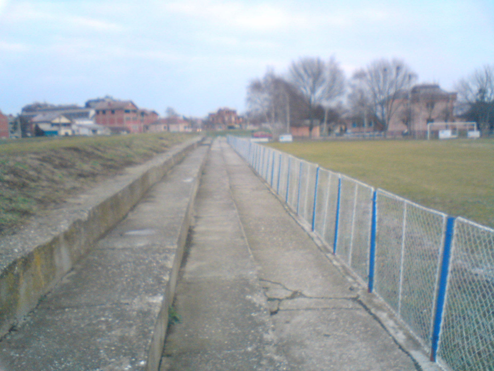 Stadion FK Sloga Batočina.